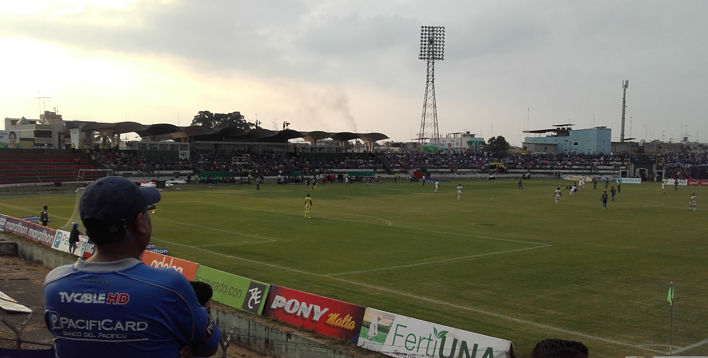 Estadio Los Chirijos durante un Partido del Campeonato Ecuatoriano Emelec vs Liga de Loja 2015